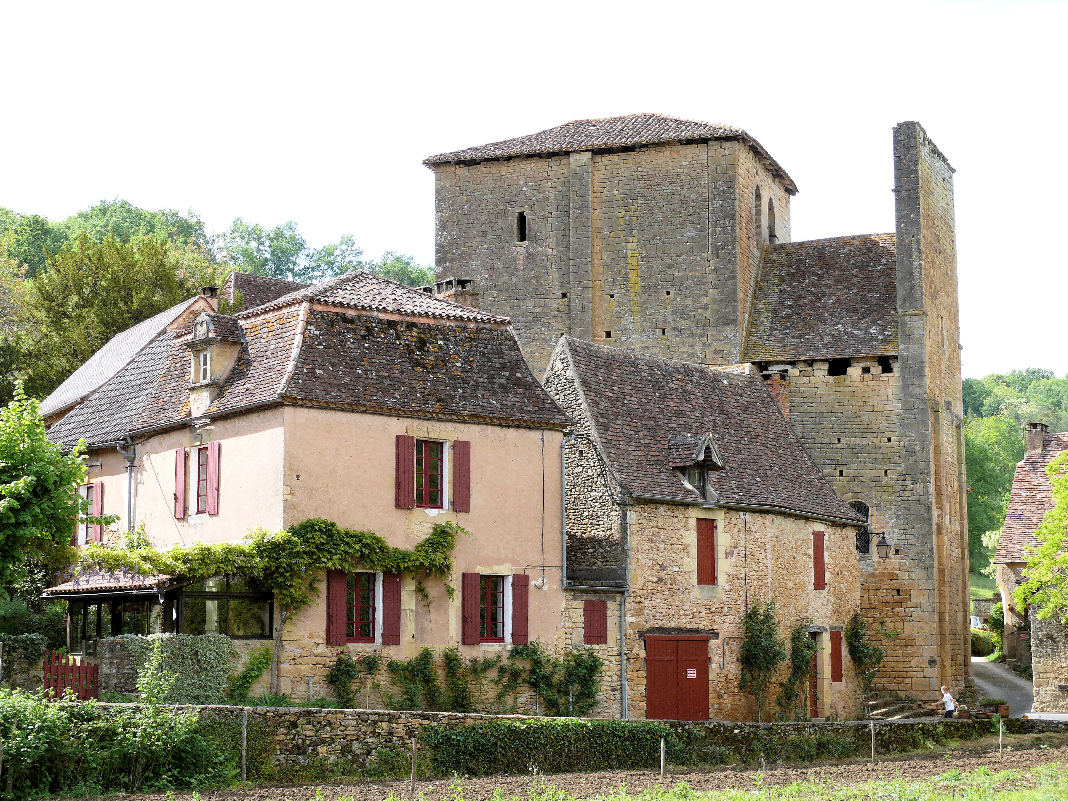 Urval - Eglise Notre-Dame-de-la-Nativité